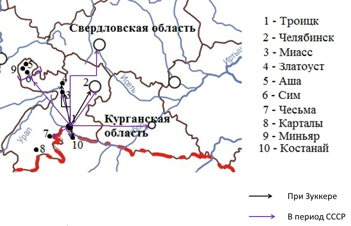 Карта экспорта пивоваренной продукции завода "Восточная Бавария" при Зуккере и в Советский период